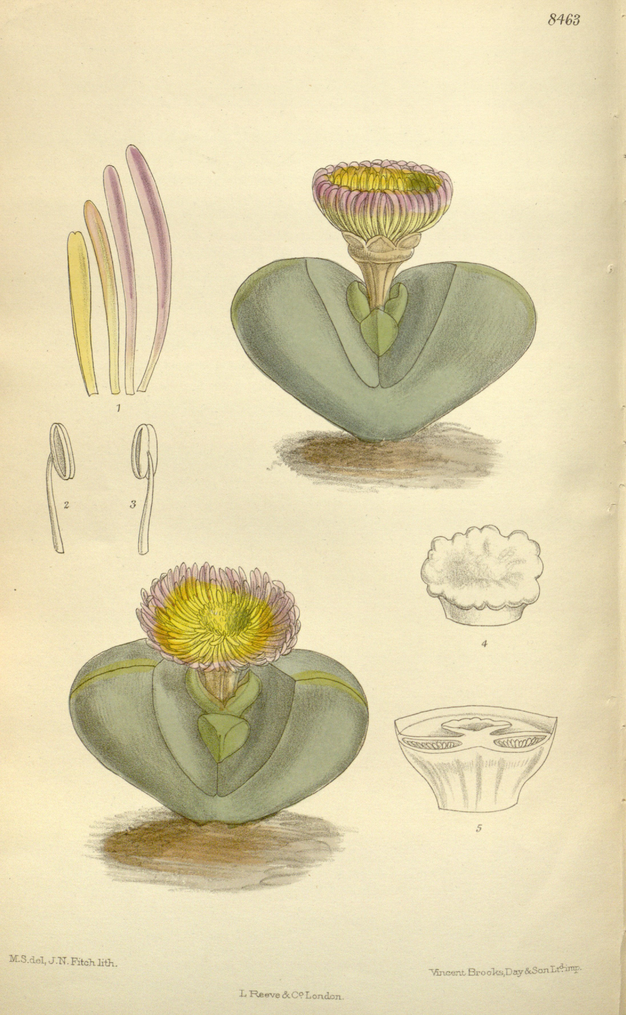 Mesembryanthemum pearsonii (= Argyroderma pearsonii), Aizoaceae